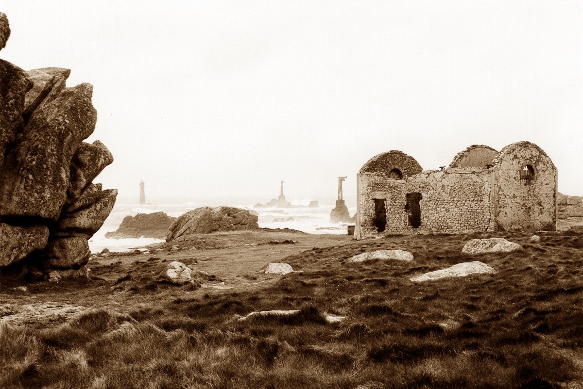 Paysage de Ouessant. Photographie par Christophe COAT